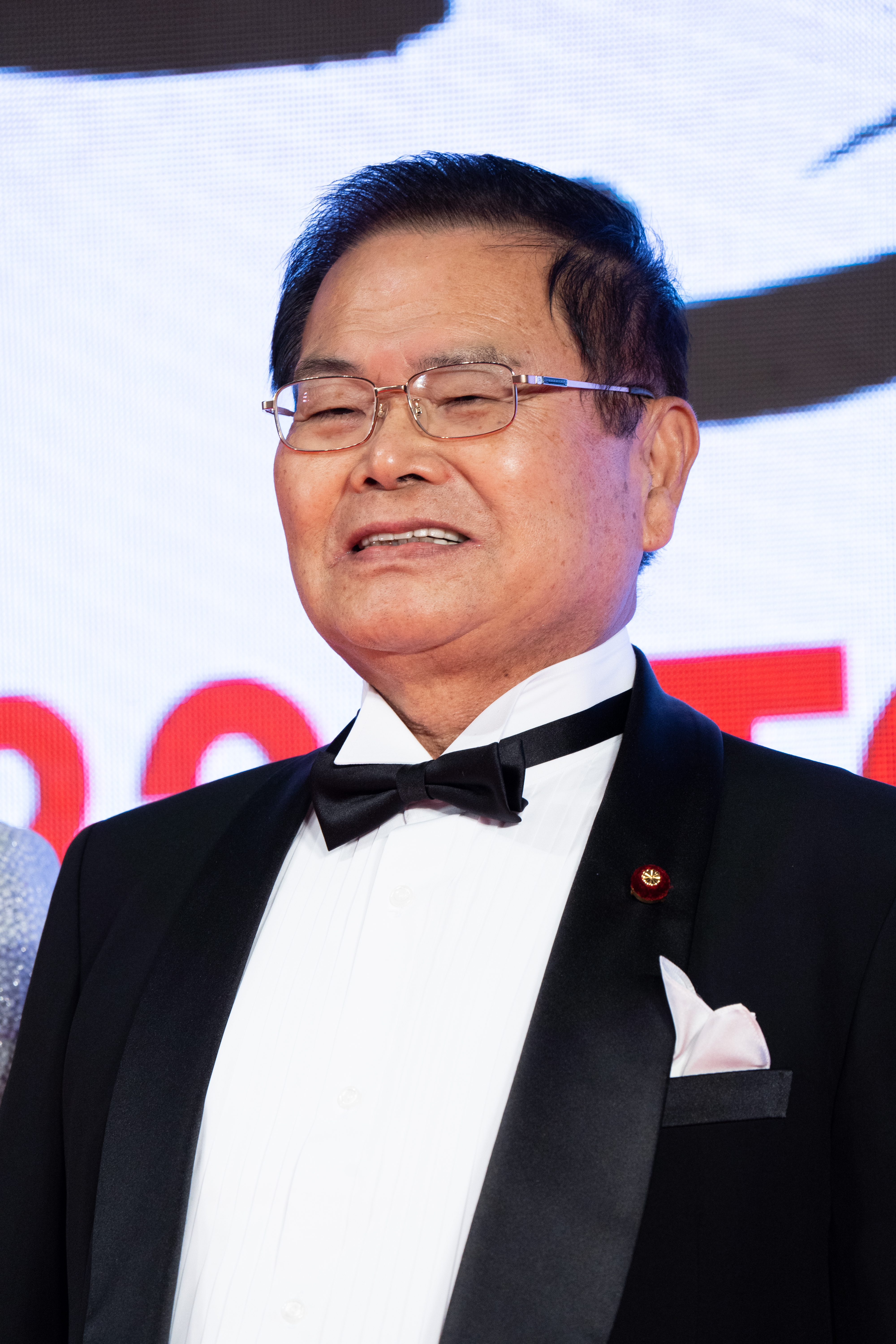 第32回 東京国際映画祭 オープニングセレモニー 竹本直一